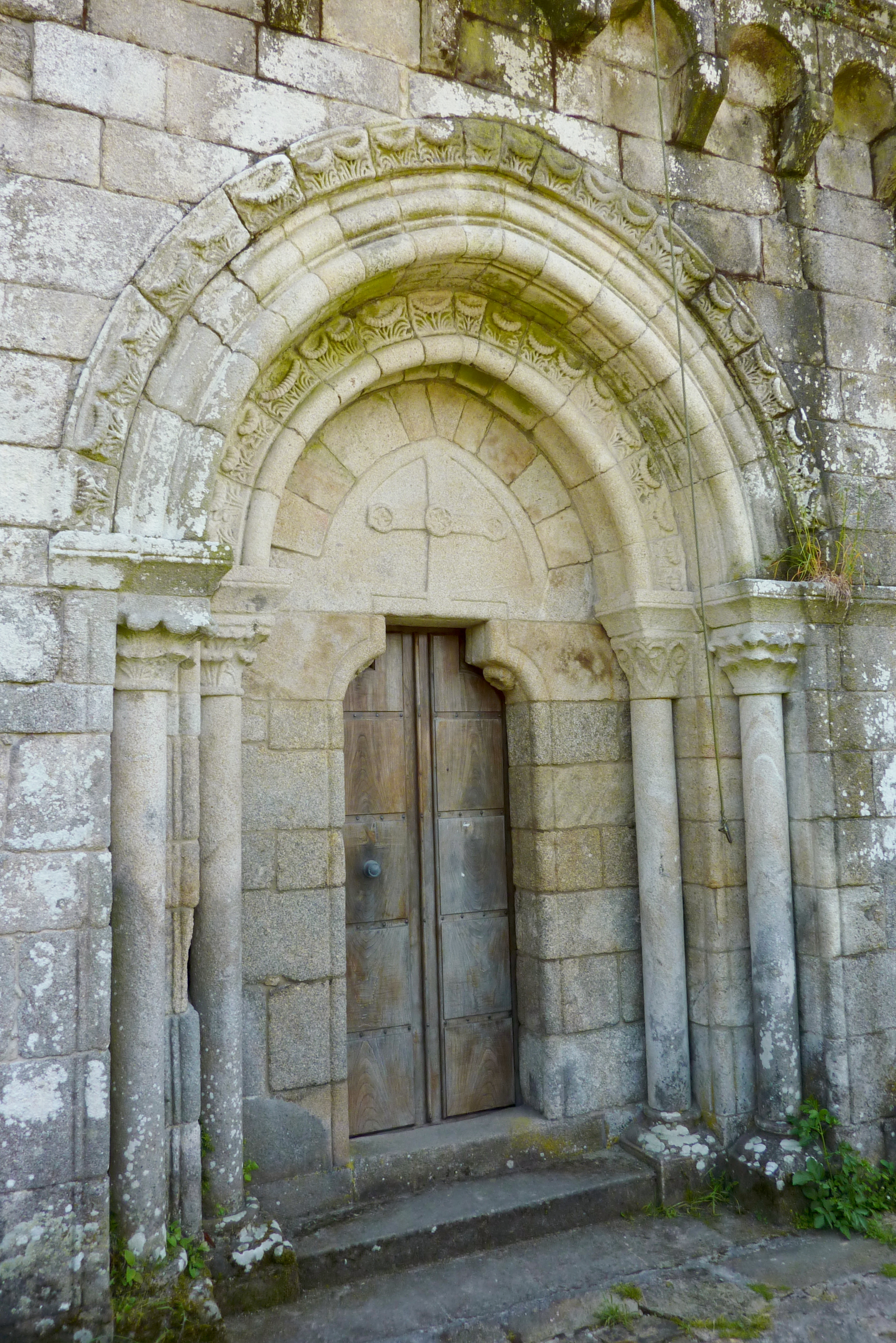 Ehemalige Klosterkirche San Pedro in Vilanova de Dozón in der Gemeinde Dozón in der spanischen Provinz Pontevedra (Galicien), Nordportal